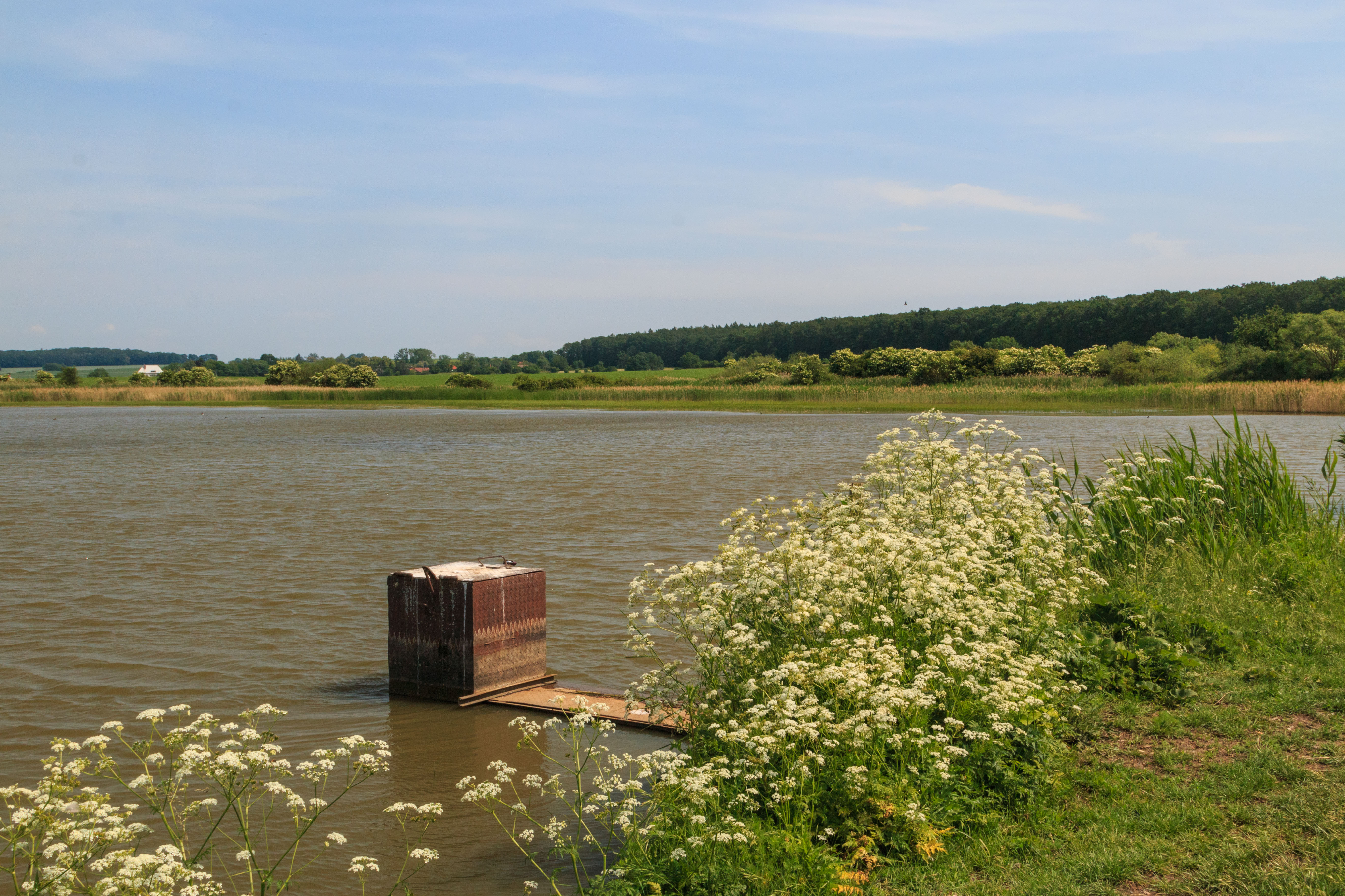 Rybník Smíchov u Slavhostic Project: Vodstvo.